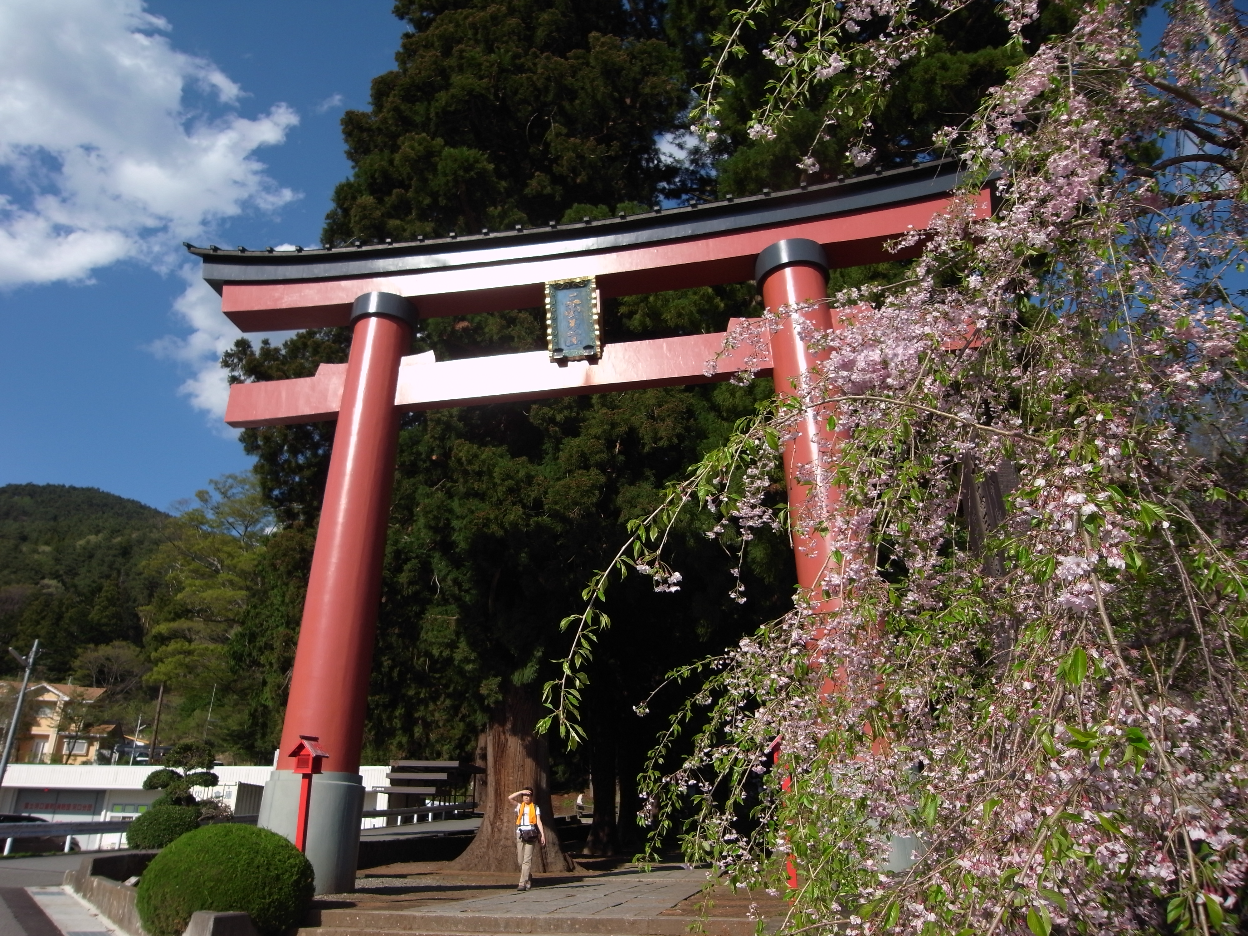 河口浅間神社 （山梨県富士河口湖町）